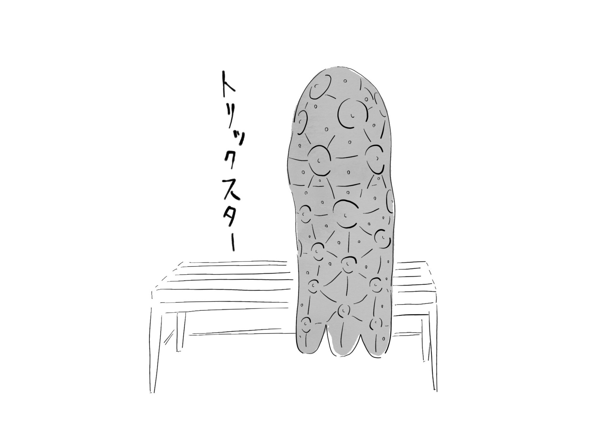 浅野暢晴の彫刻作品「トリックスター」。作家本人によるイラスト。